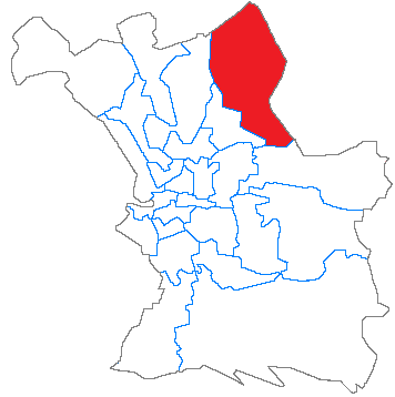 Situation du canton dans la ville de Marseille